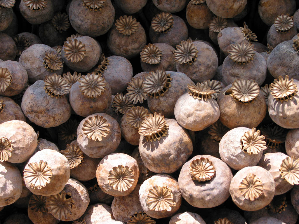 Mohnkapseln (Papaver somniferum), getrocknet